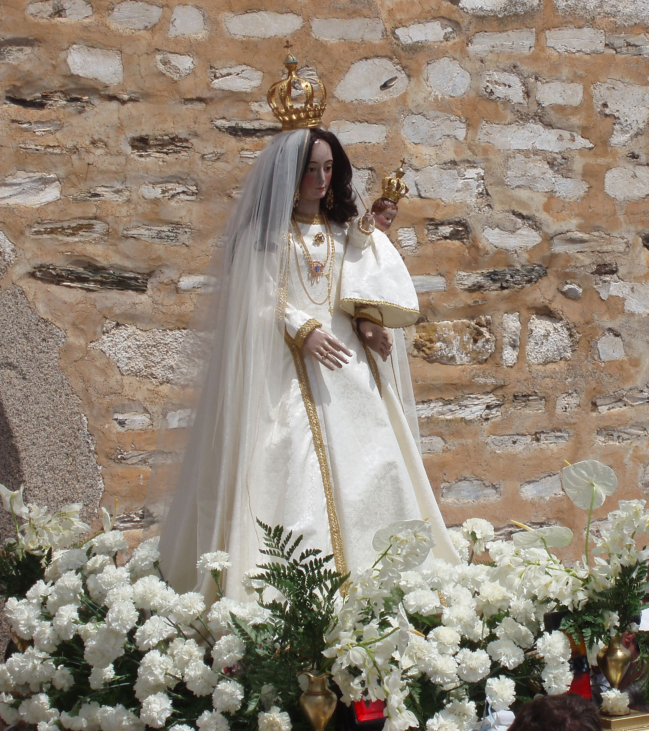 Procissão de Nossa Senhora da Boa Nova, Terena, Alentejo, Portugal